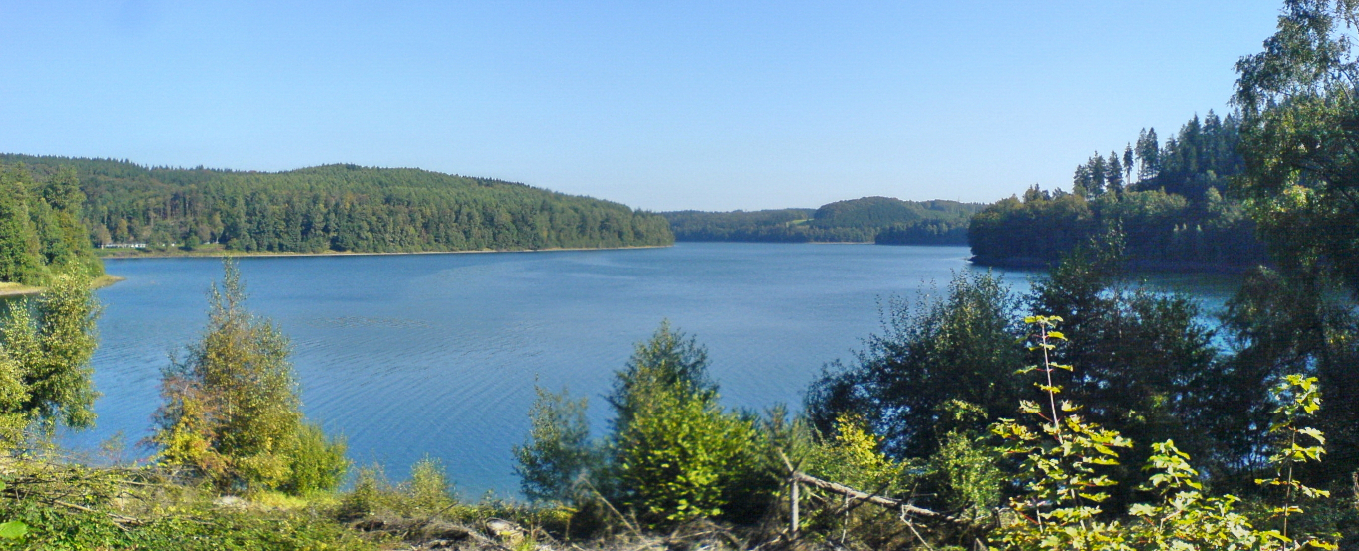 Versatalsperre, links der Wanderparkplatz "Hohkühler Bucht/ Klamer Brücke" unterhalb dessen sich das Konzentrationslager "Hunswinkel" befand. Die Zwangsarbeiter dieses Lagers wurden beim Bau der Talsperre eingesetzt.